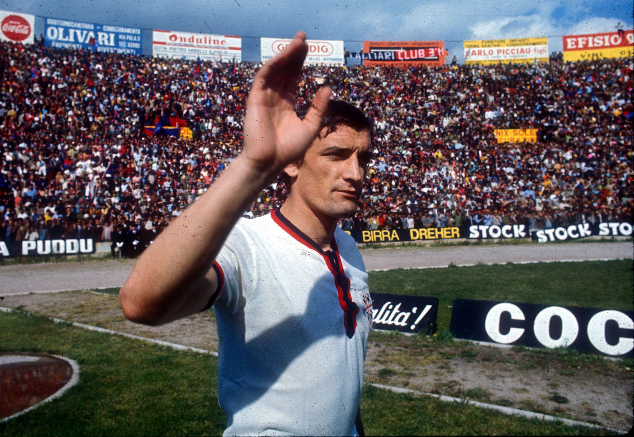 Il calciatore italiano Luigi "Gigi" Riva al Cagliari, 1970 circa.